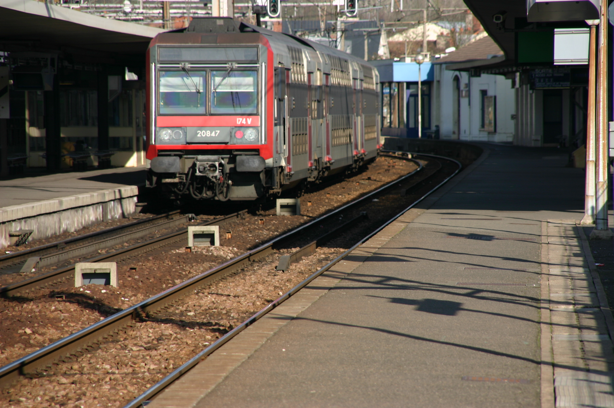 La gare de Corbeil-Essonnes, Corbeil-Essonnes, département de l'Essonne (France)